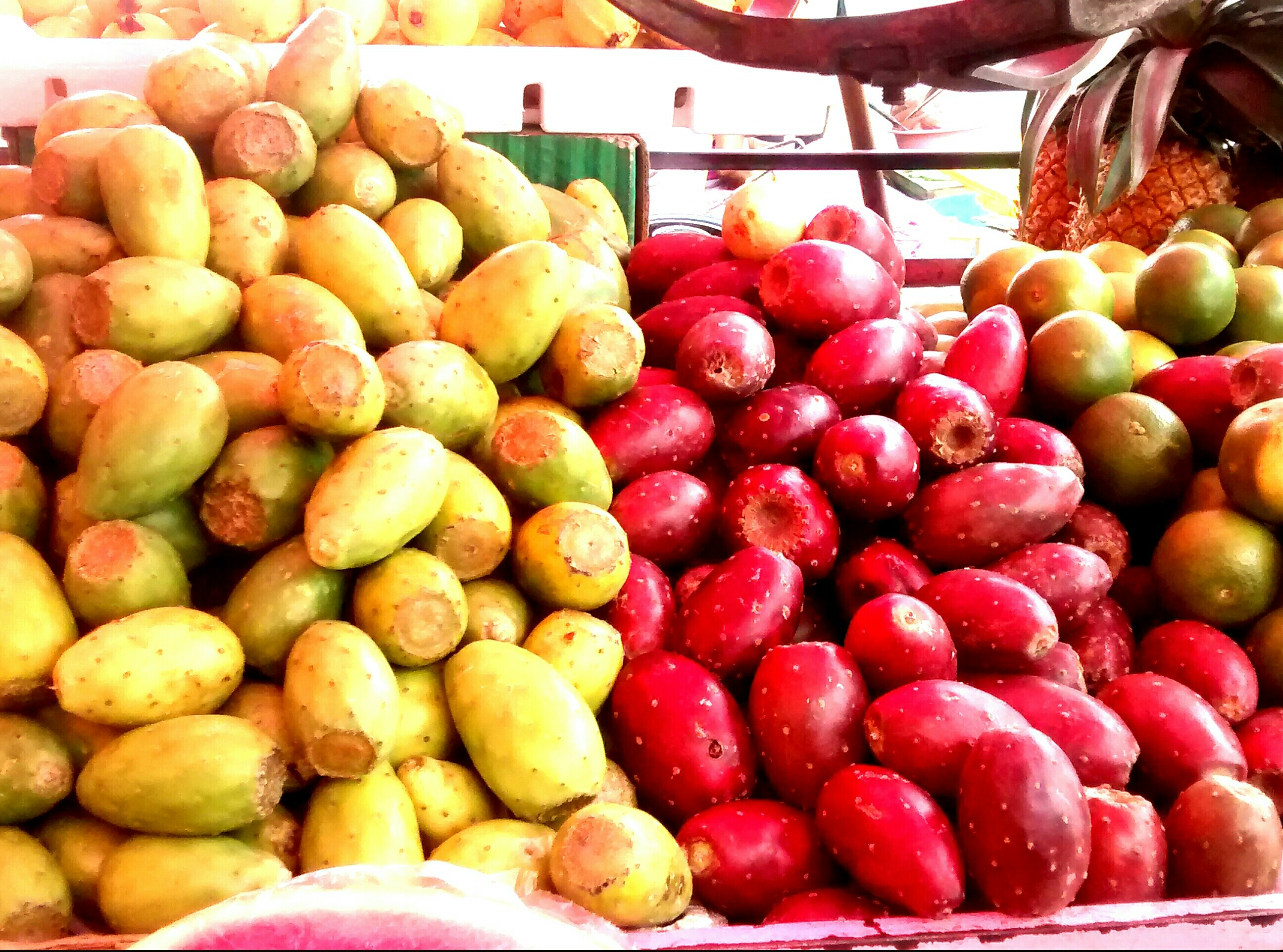 Fruta mexicana proveniente del Nopal que es una planta de la familia de las cactáceas. Venta en el tianguis ubicado al frente de la Iglesia Santa Cecilia en la delegación de Xochimilco, ubicado al sur de la Ciudad de México.